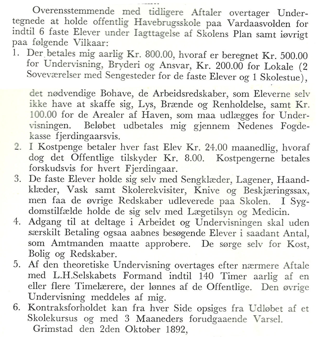 Kontrakt mellom Thomas Kristensen og Nedenes Amt.